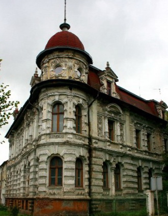 Вилла Франка. Советск, Калининградская обл.